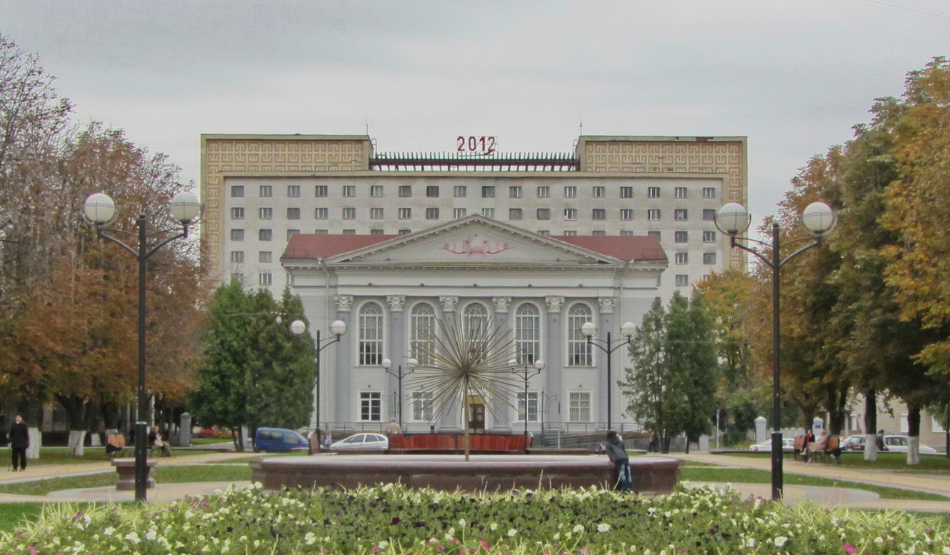 Беларуская (тарашкевіца): Будынак абласной бібліятэкі ймя У.І. Леніна. г. Гомель This is a photo of Belarusian heritage monument. Reference number: 313Г000054 ( WLM)